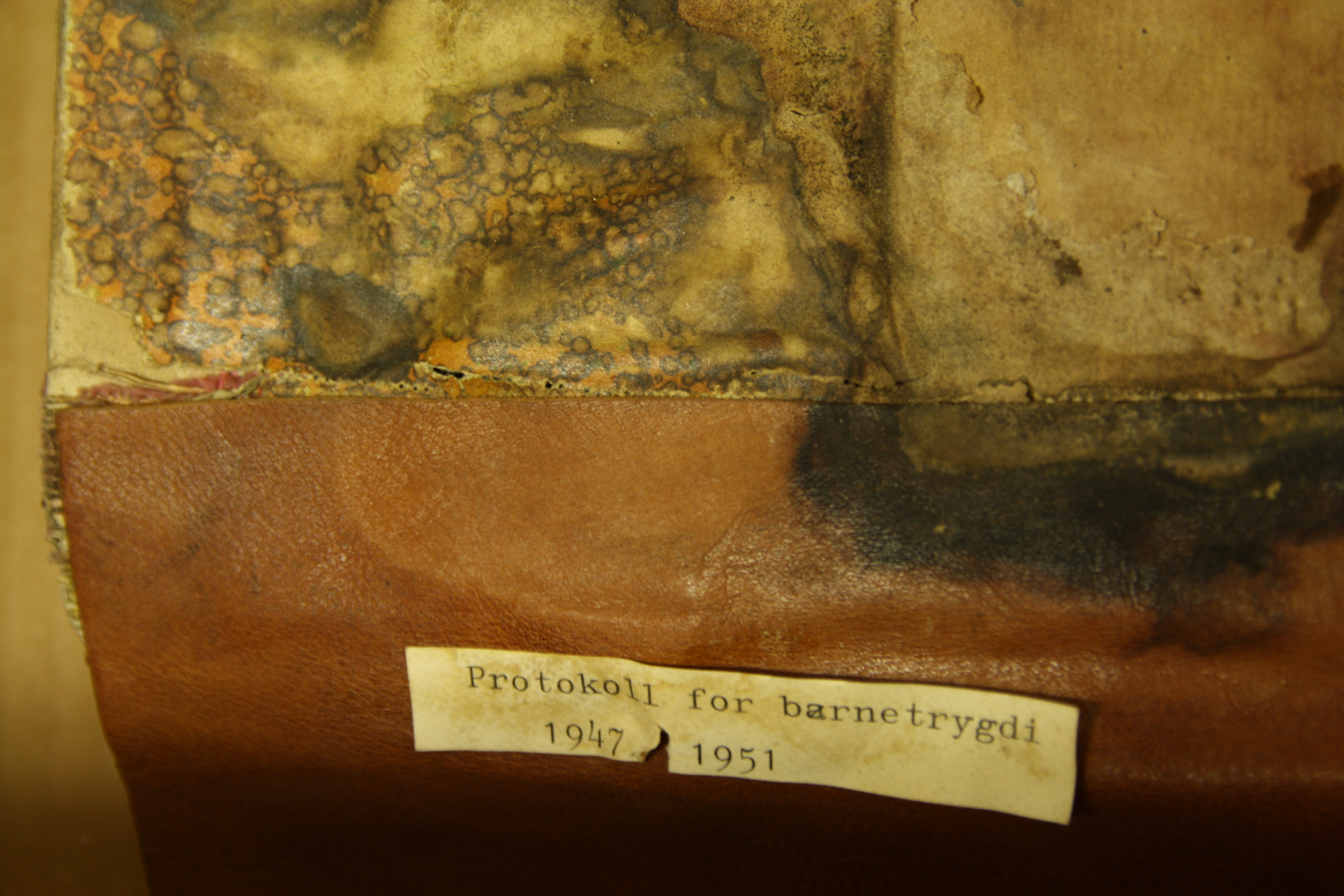 Muggskadet protokoll